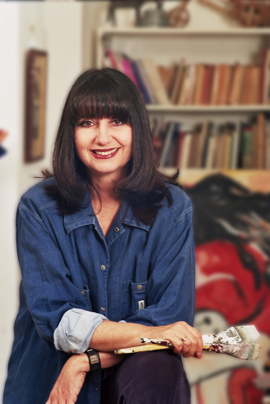 Israeli Artist Ilana Raviv